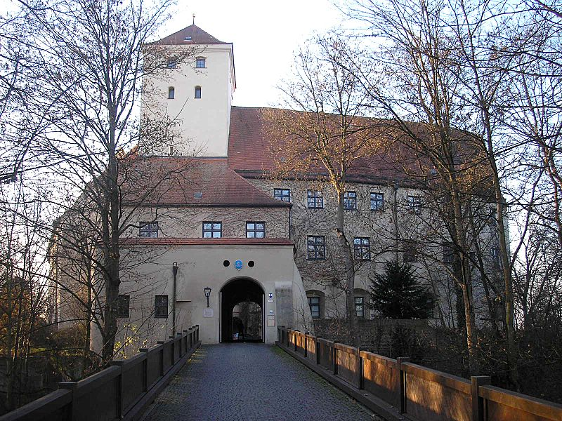 Schloss Friedberg (Landkreis Aichach, Friedberg, Bayerisch-Schwaben). Ansicht von Osten. Eigene Aufnahme, Nov. 2006 / Friedberg castle near Augsburg (Bavaria, Germany). View from the east. Own photo, Nov. 2006